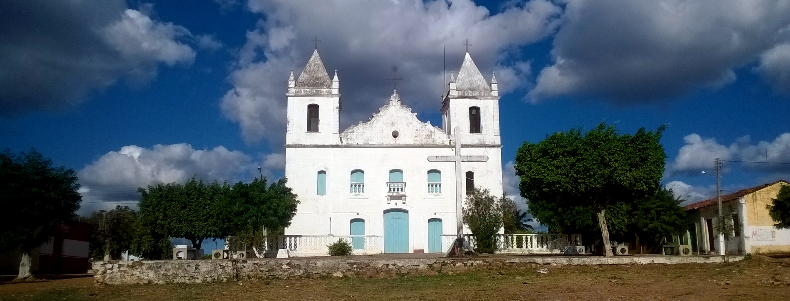 Panorama da Igreja Matriz de Santo Antônio, Paratinga, em junho de 2016.